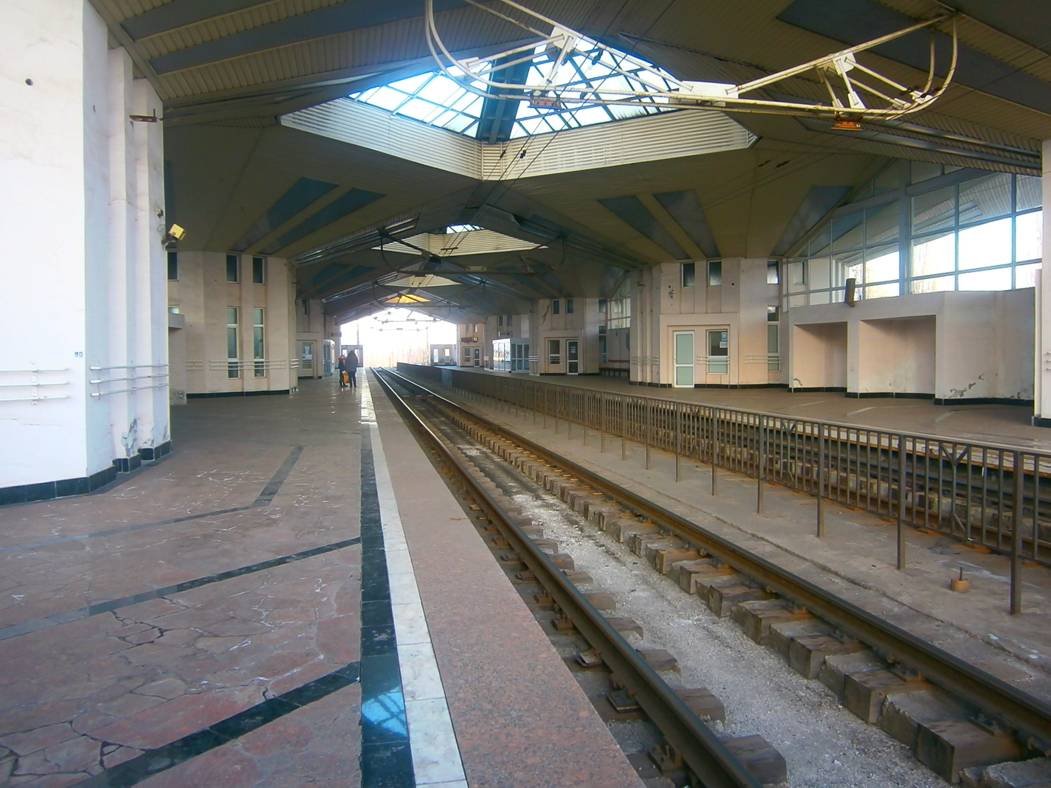 Metro Krivoy Rog